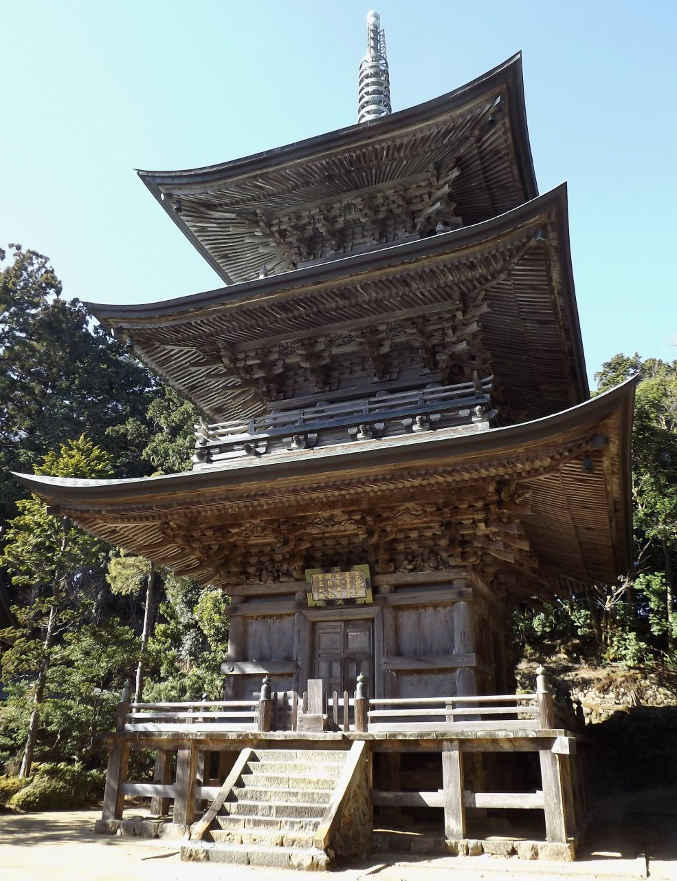 鶴林寺の三重塔